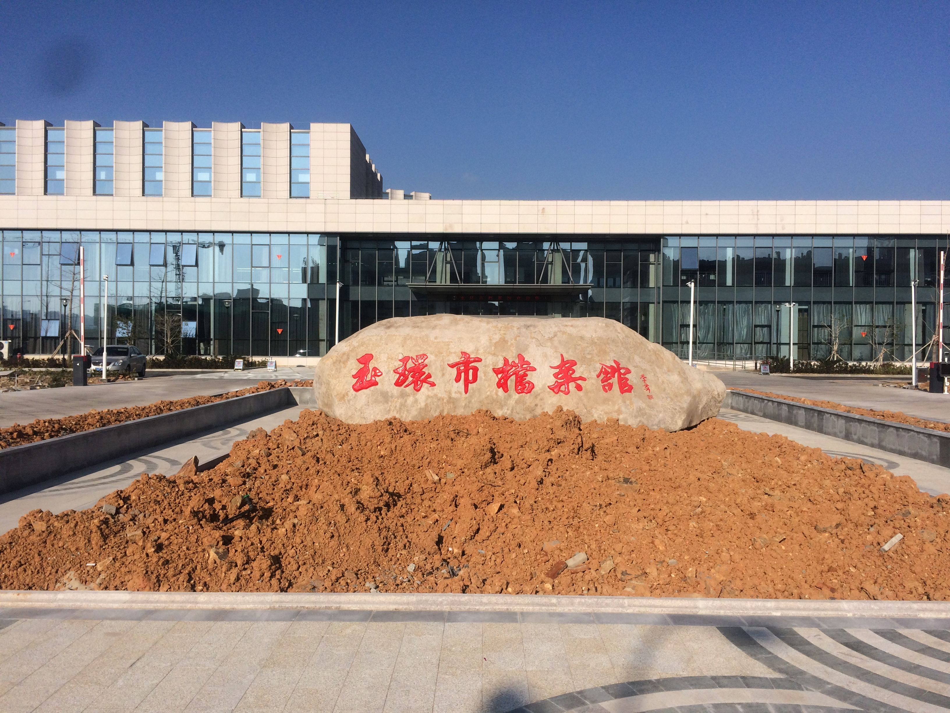 中文（中国大陆）: 玉环市档案馆